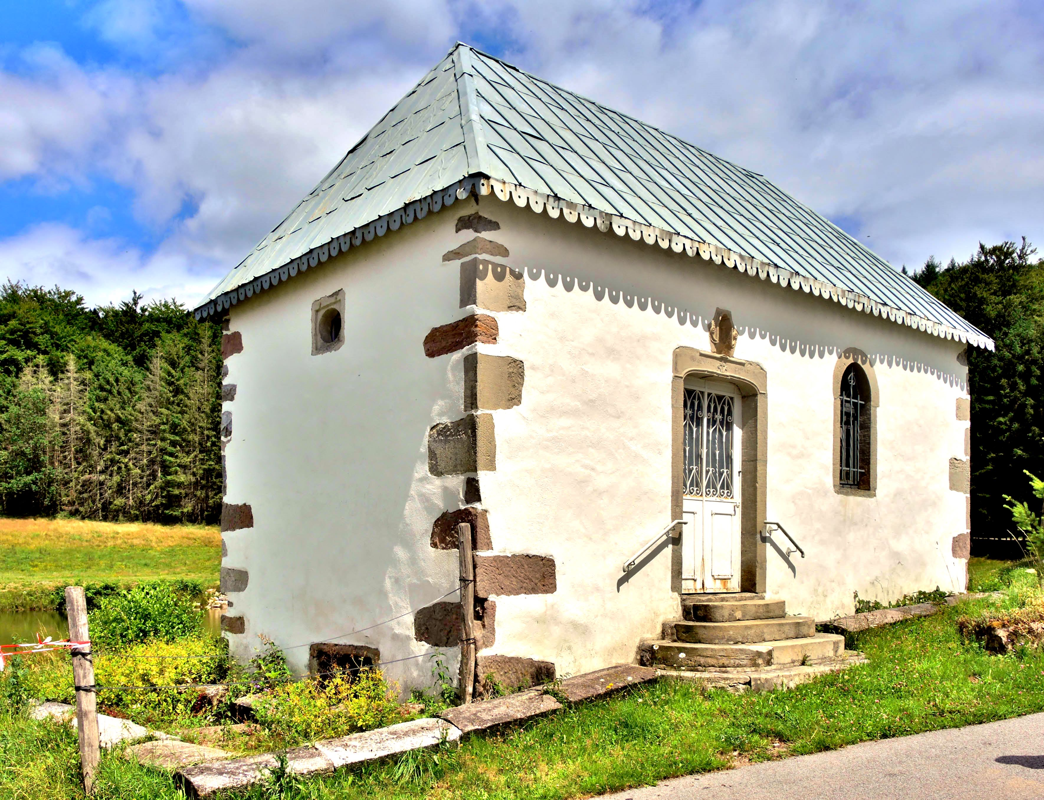 Chapelle Sainte Claire à Saint-Romary. Saint-Etienne-lès-Remiremont. Vosges